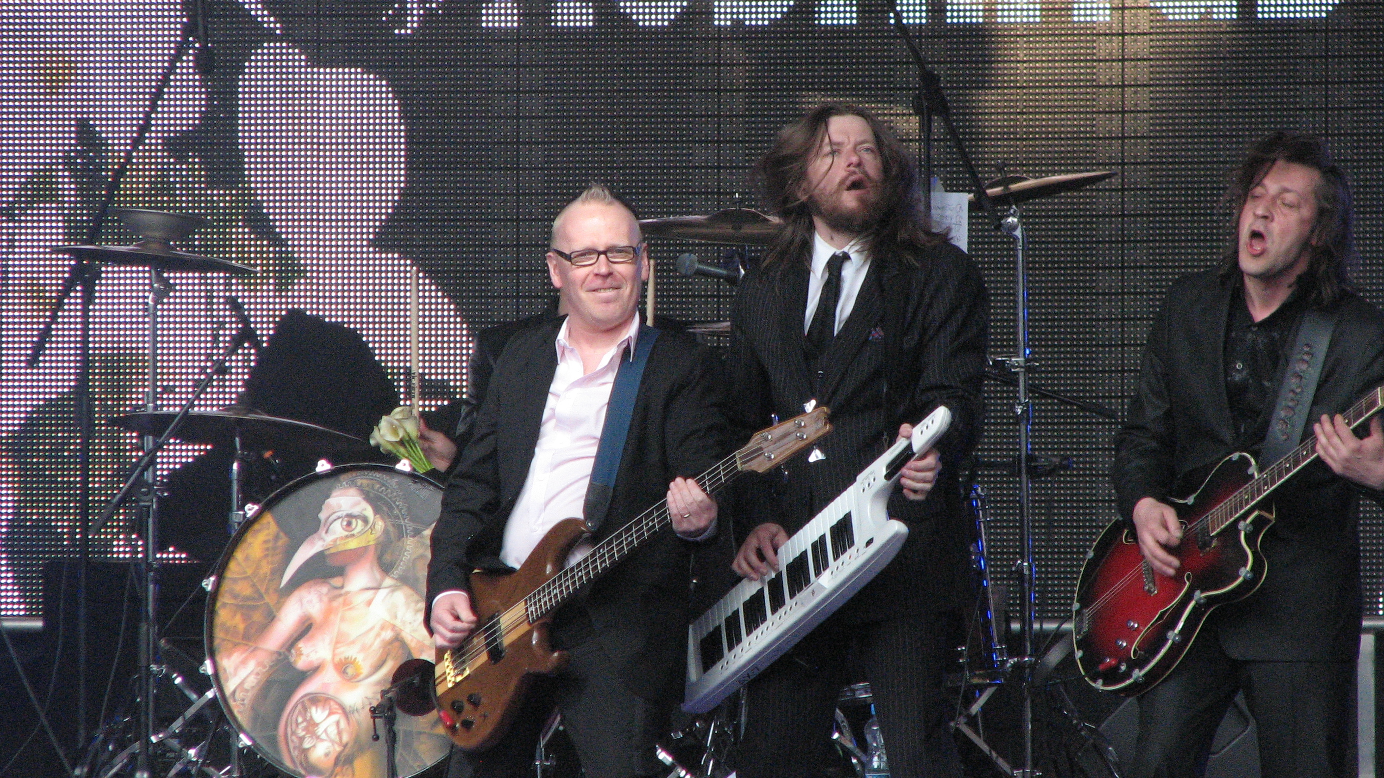 Kosmikud esinemas Tallinna päeval